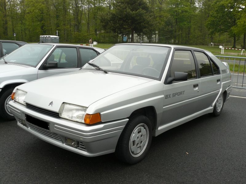 Français cadien: Montlhlery Avril 2012